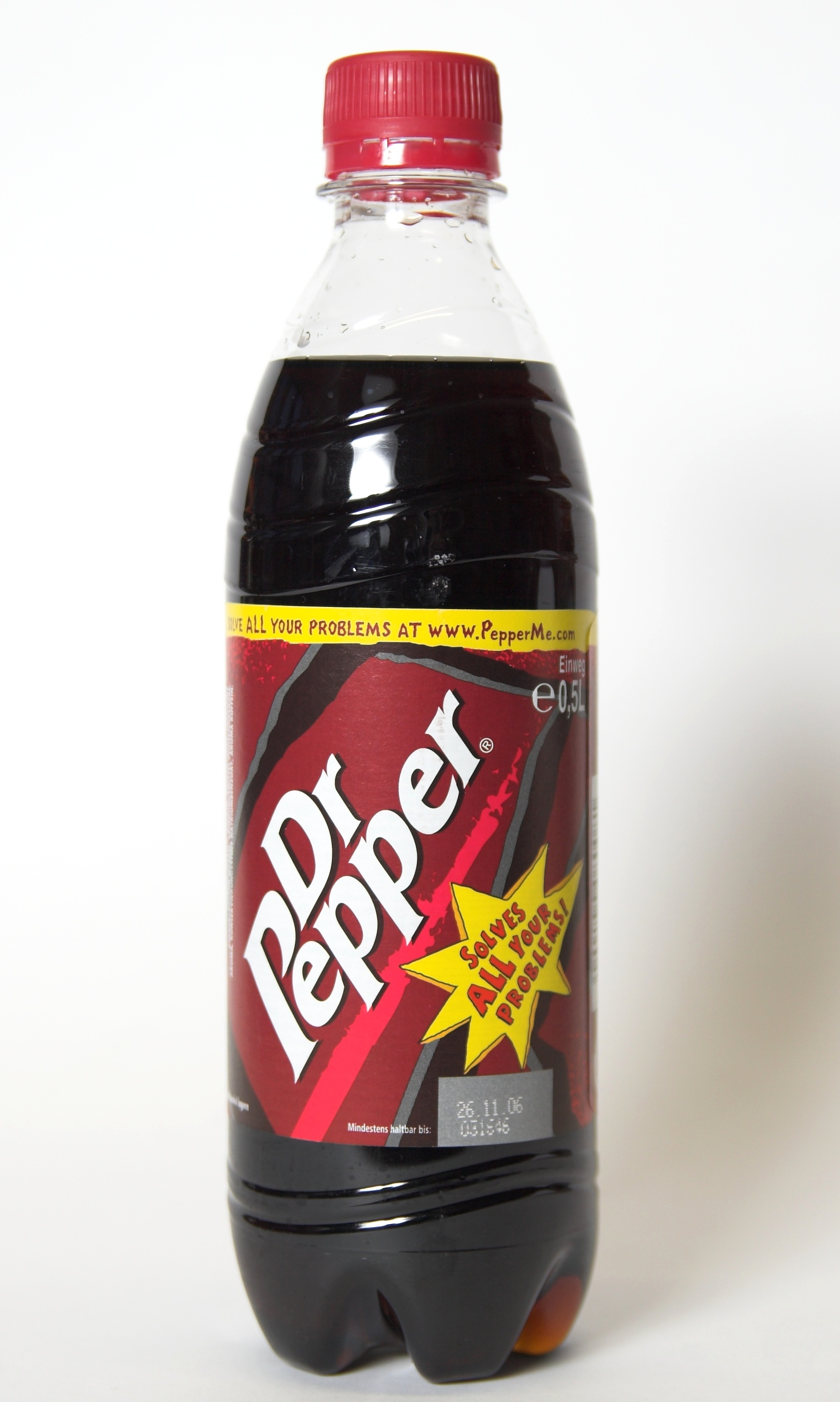 Dr Pepper soft drink.